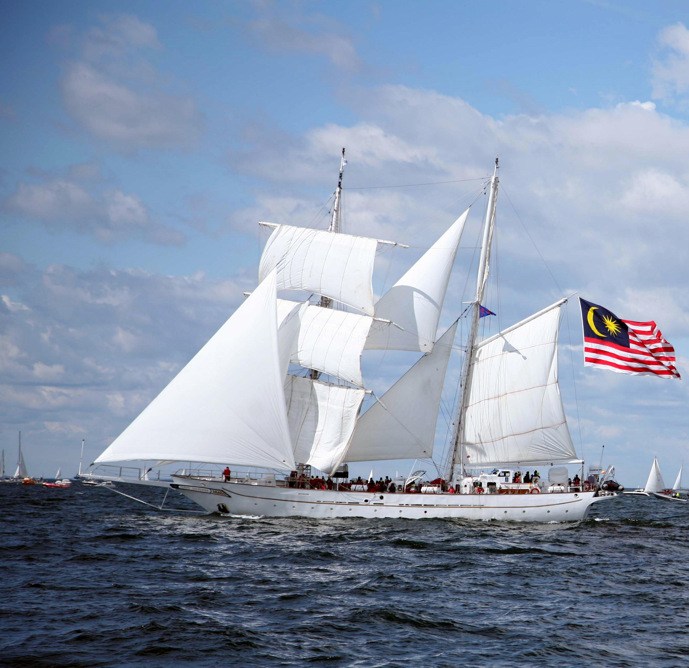 La goélette Tunas Samudera - Malaysie